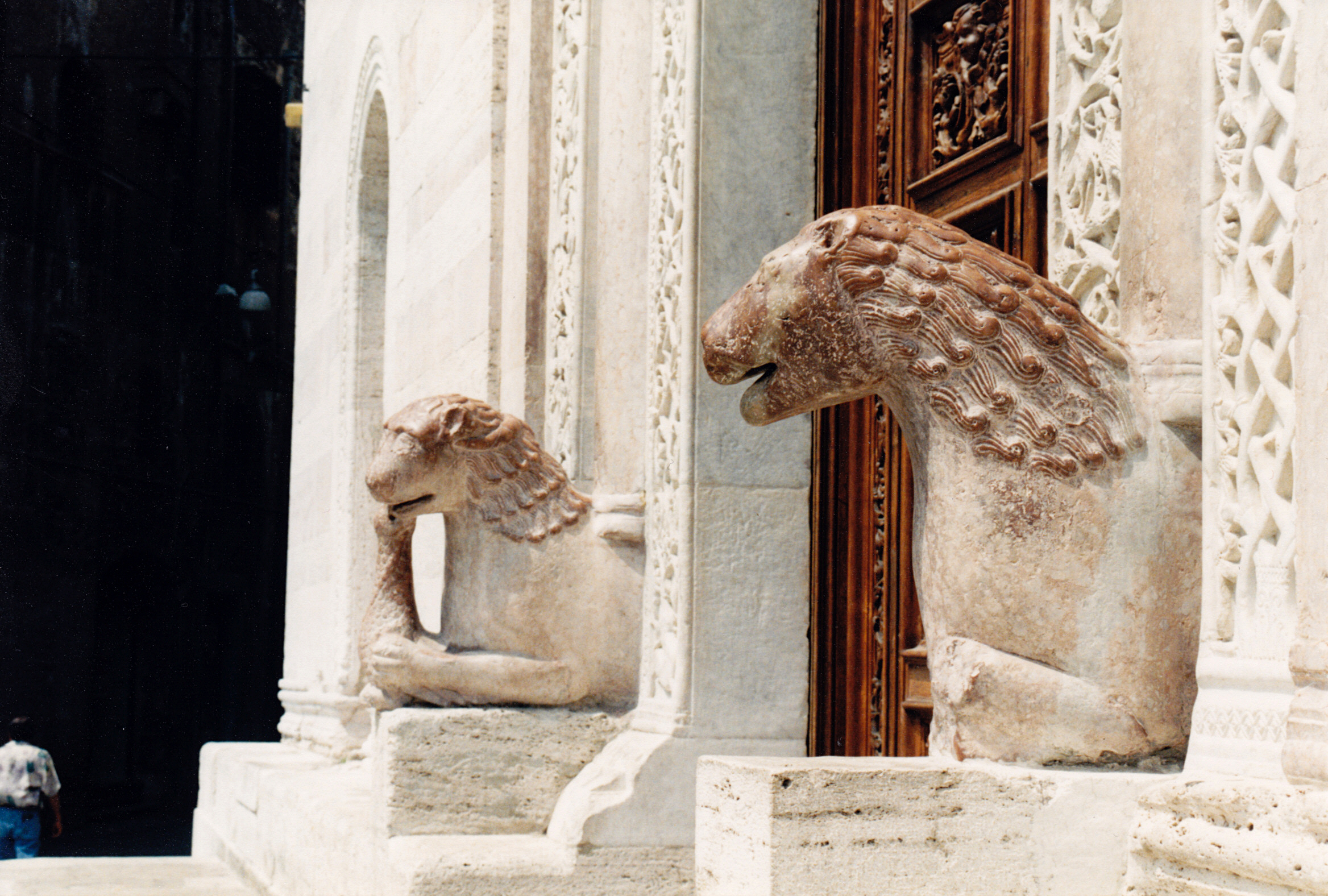 Italie - Ombrie - Cathédrale de Foligno